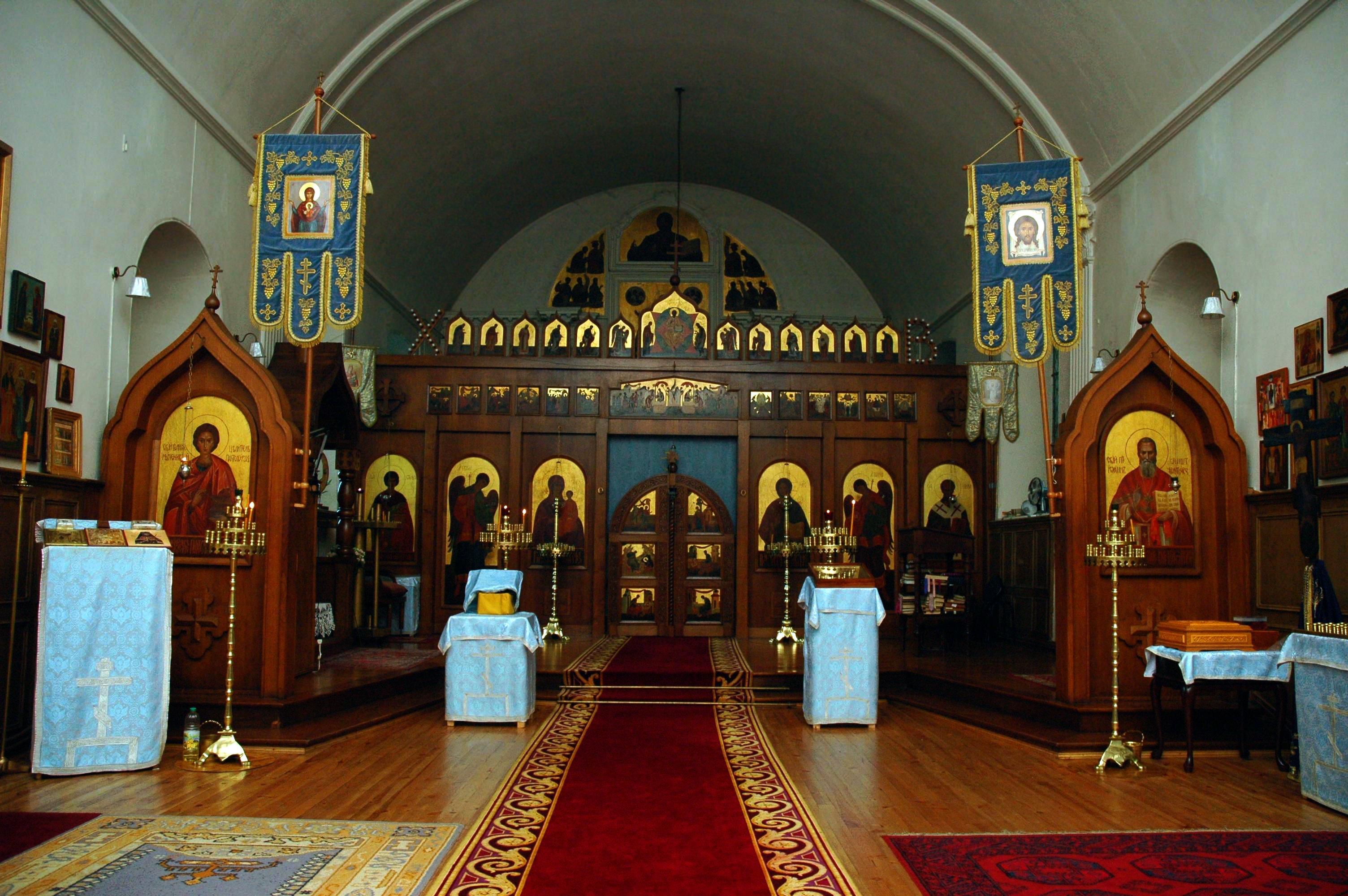 Главный храм Леснинской обители, посвященный Пресвятой Богородице. Снимок сделан при включенном паникадиле. L'église principale du couvent orthodoxe de l'icône de Notre Dame de Lesna.